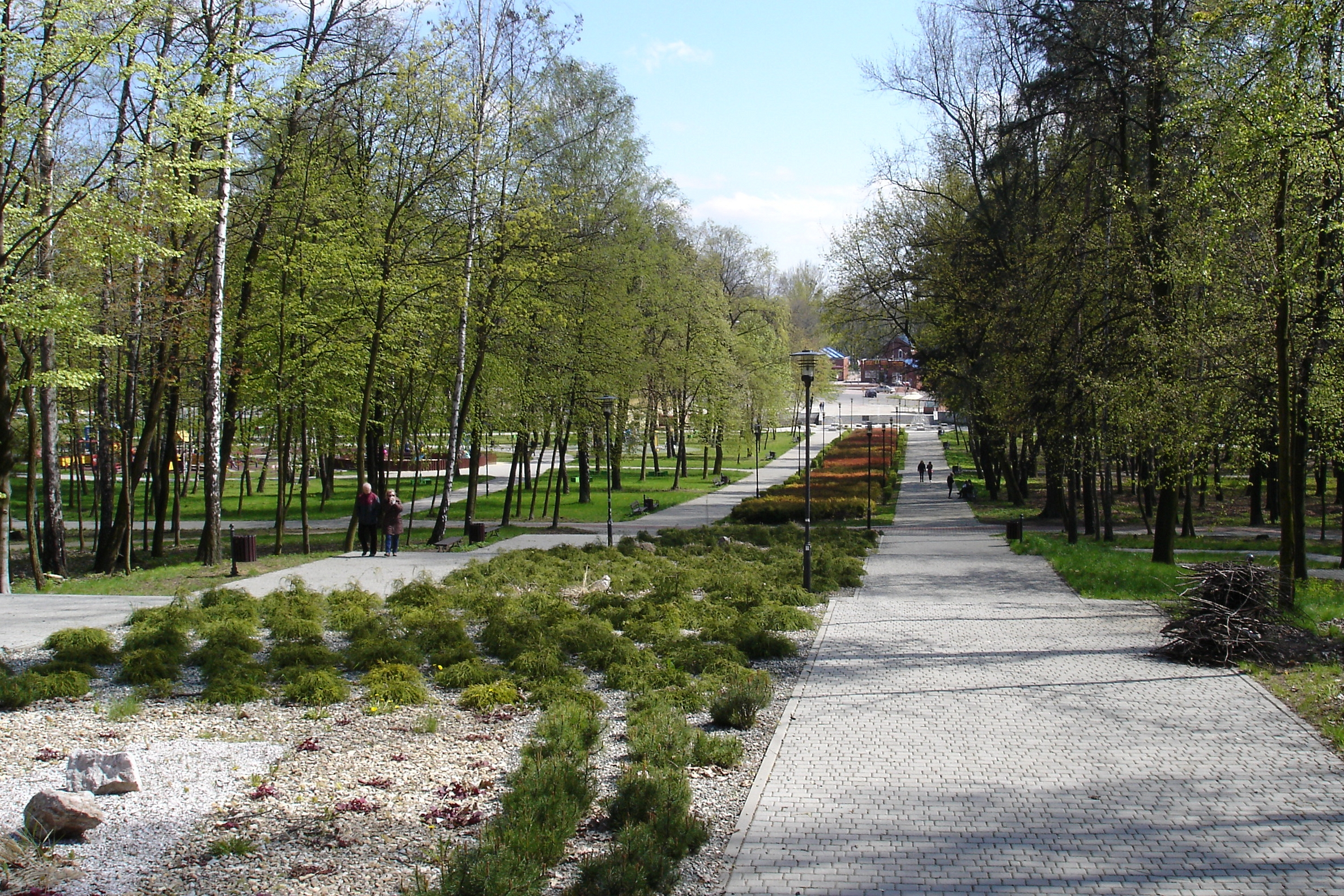 aleja w parku w Wojkowicach